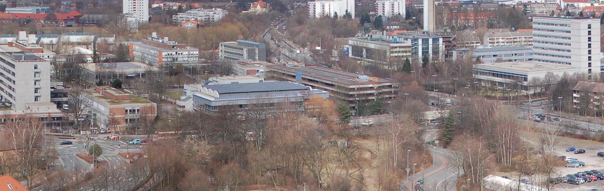 Das "Coesfelder Kreuz" in Münster, Westfalen, vom Dach des Universitätsklinikums.